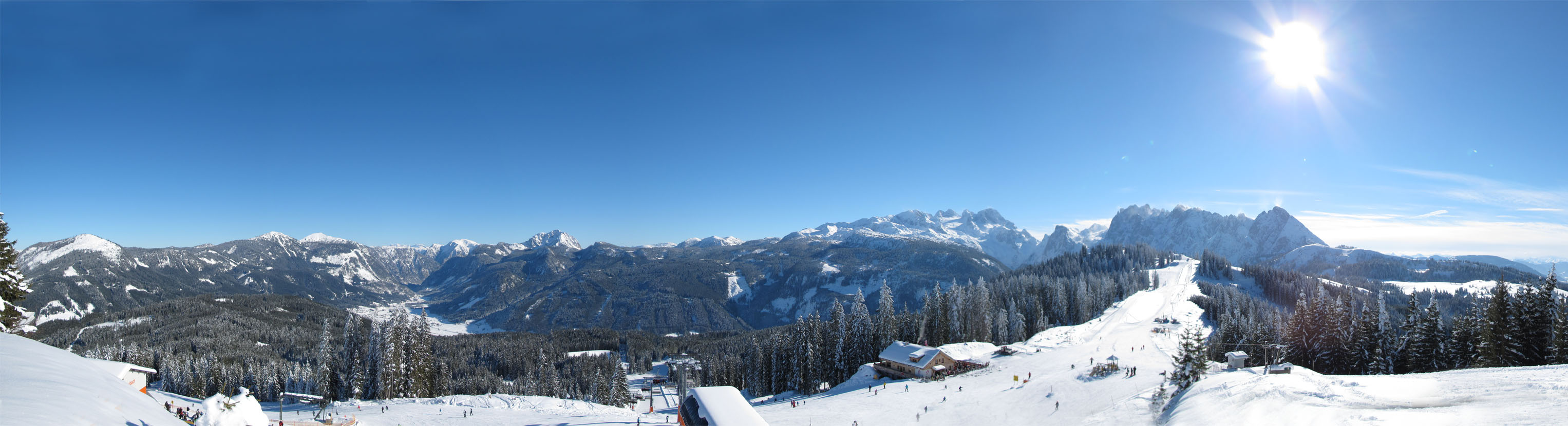 Blick vom Hornspitz (1.433 m) in Richtung Gosau, Skigebiet Dachstein West